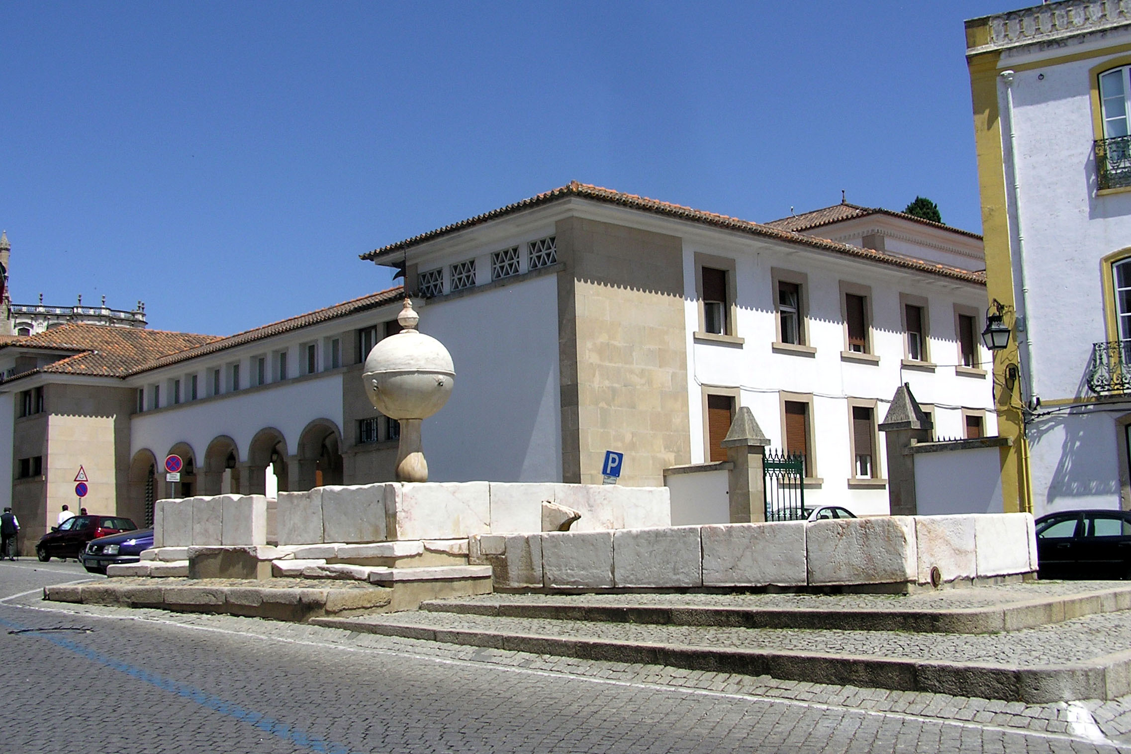 Renaissance fountain at Largo das Portas de Maura, Évora, Portugal